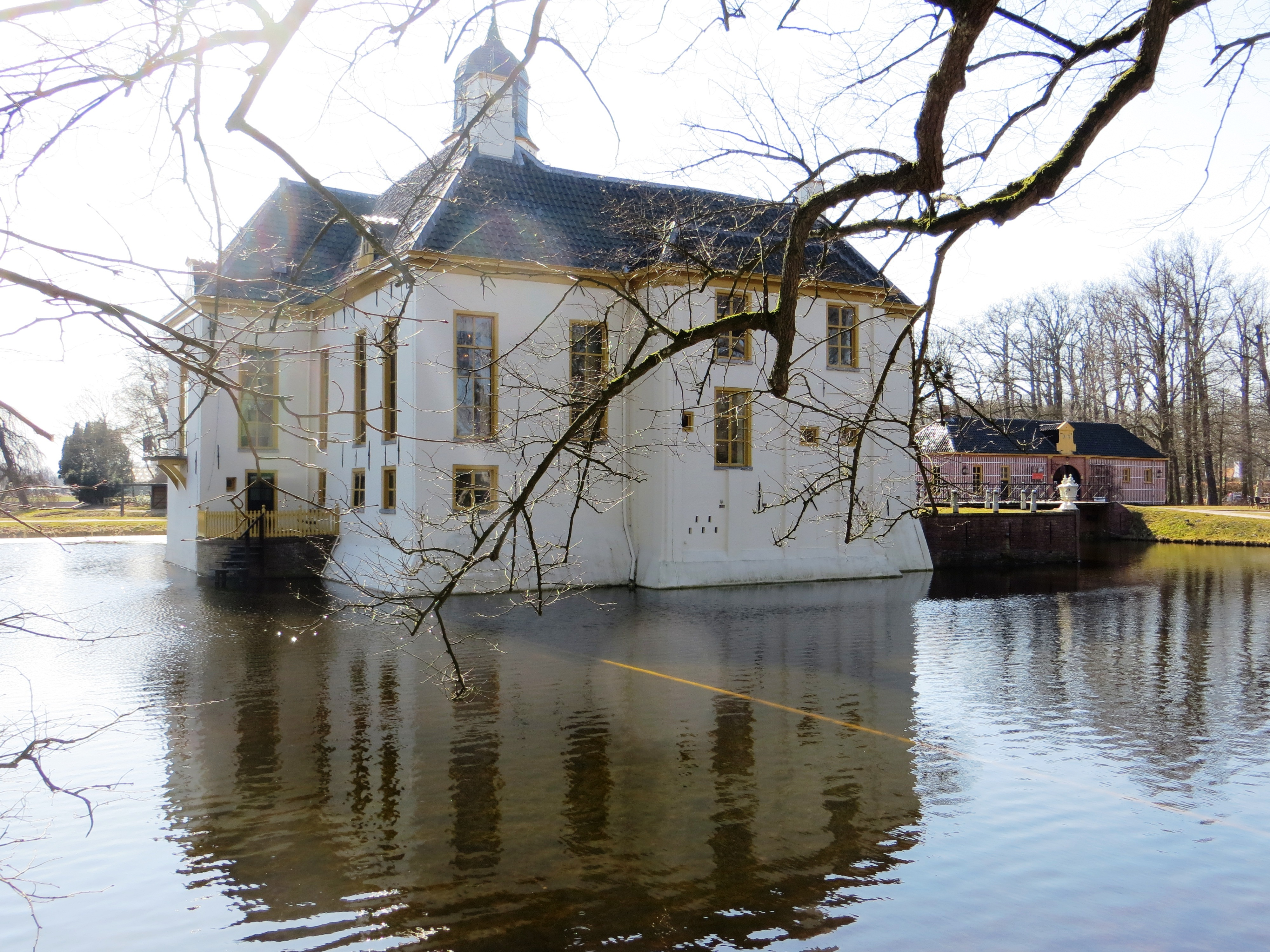 Fraeylemaborg - Slochteren